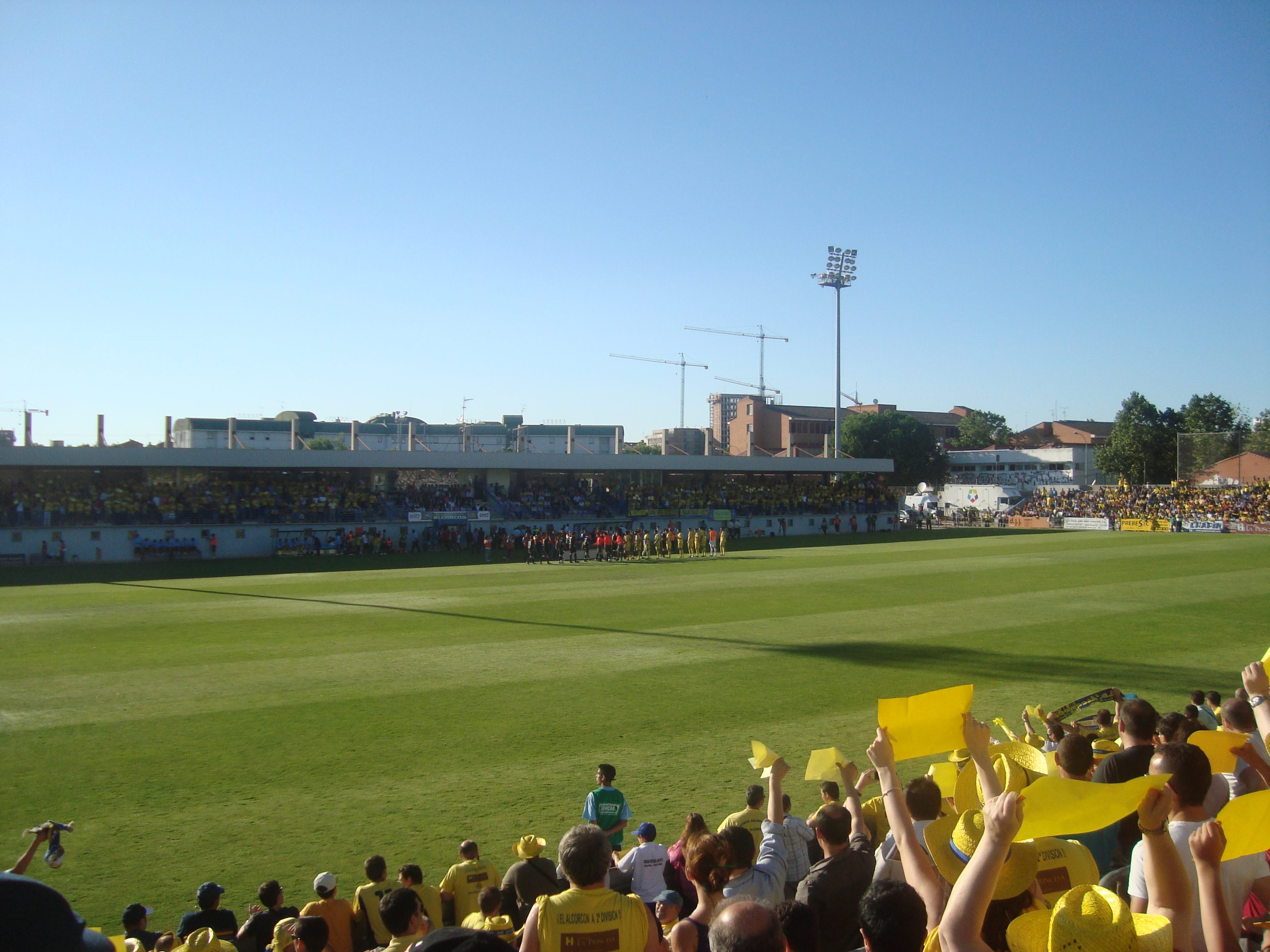 Partido entre Alcorcón y Ontiyent en la fase de ascenso a Segunda División.